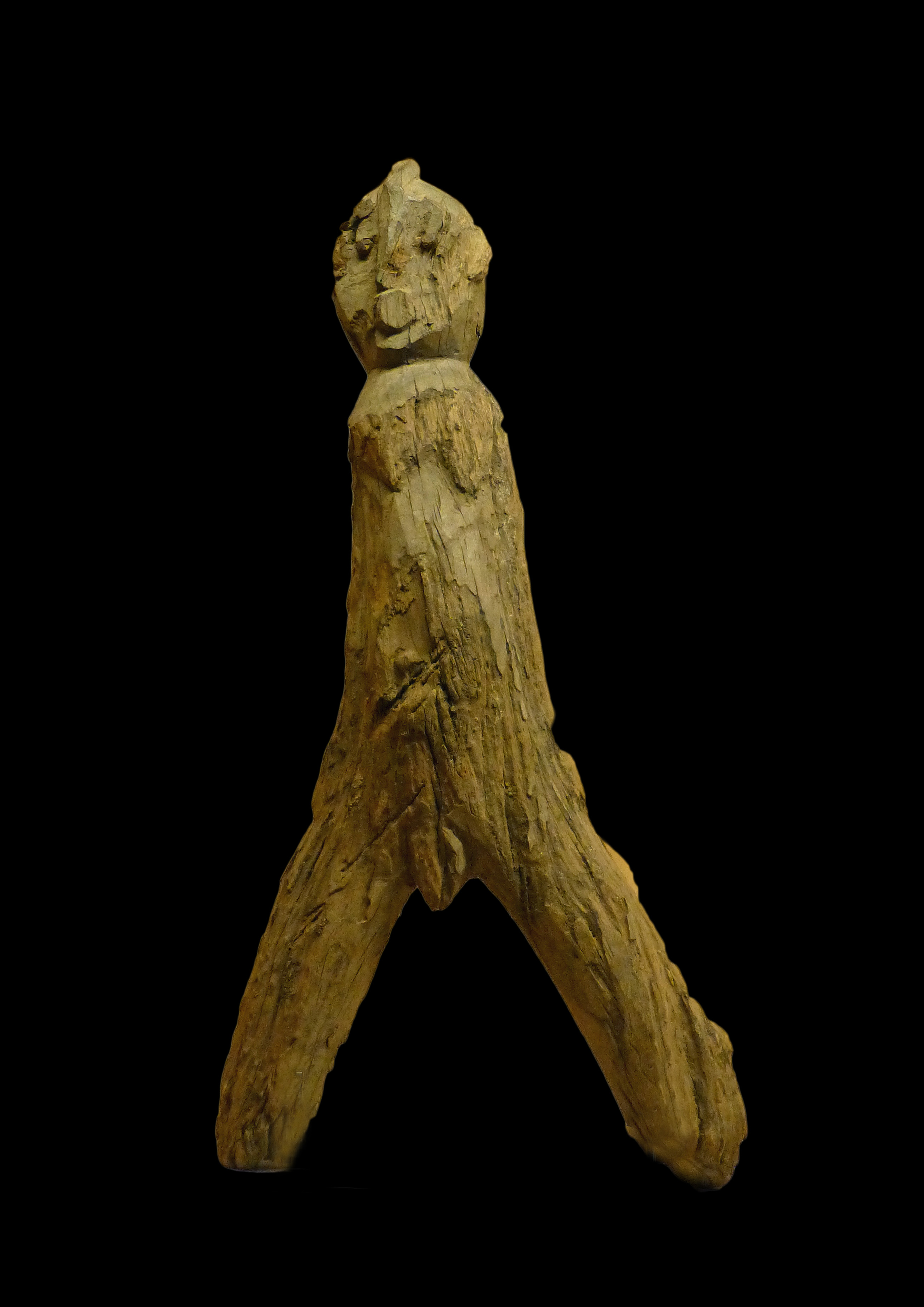 Représentation d'ancêtre dite en Y inversé (Burkina Faso, Dagara), bois. Collection particulière. Objet présenté dans le cadre d'une exposition temporaire (Passages. Rites initiatiques et funéraires, 2015) au Musée alsacien, par les étudiants de Master2 de Muséologie.